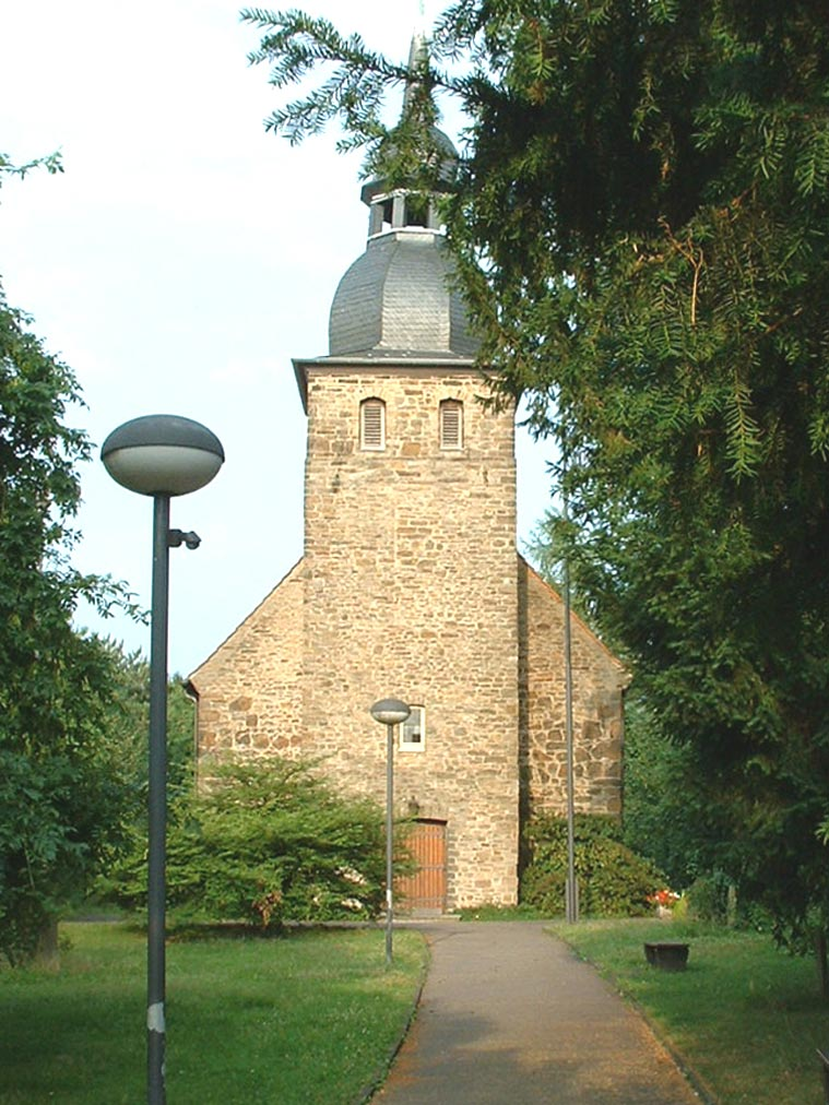 Ev. St Patrokluskirche in Dortmund-Kirchhörde Sonstiges: ...